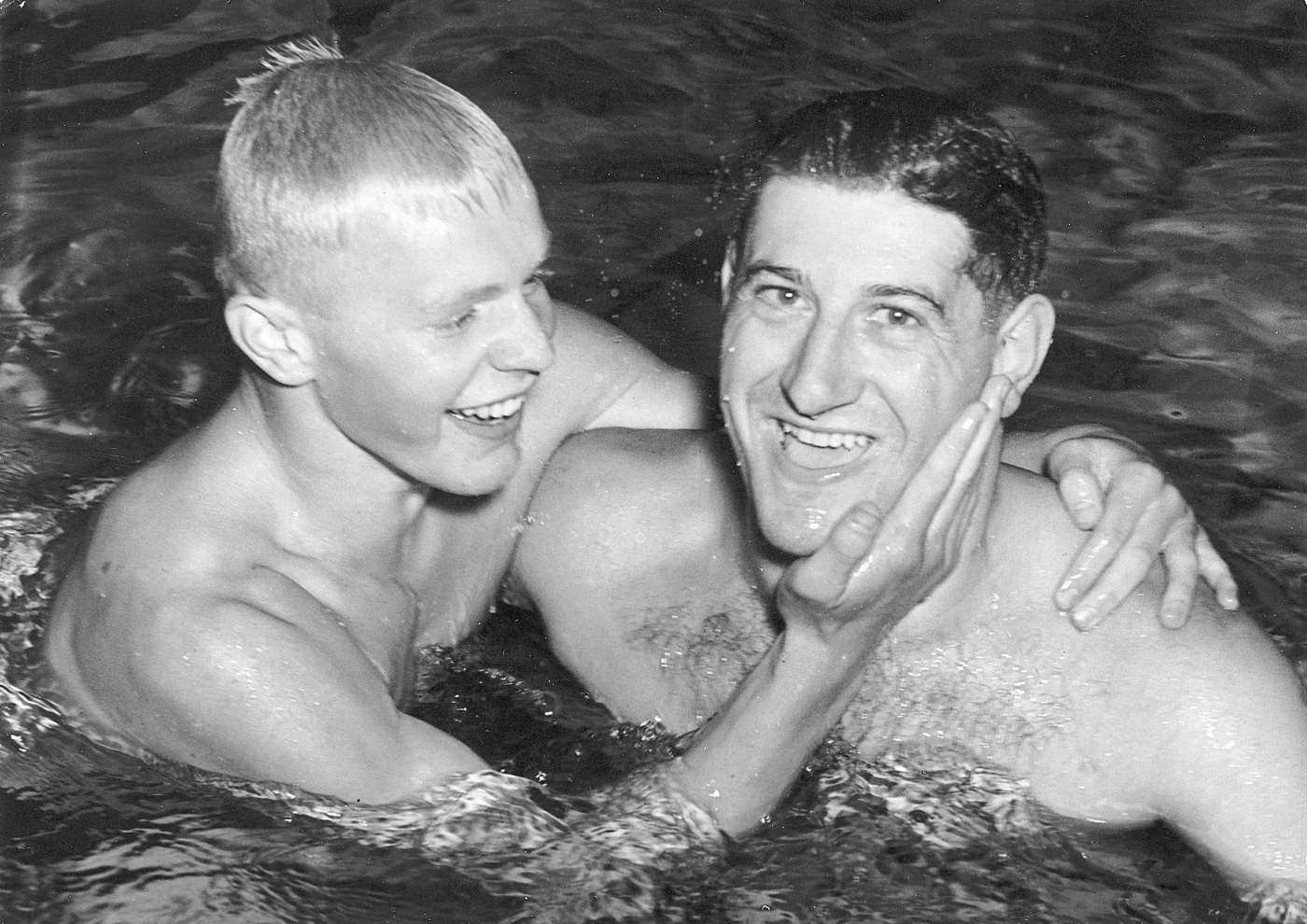 Göran Larsson (left), Olle Johansson? (right)